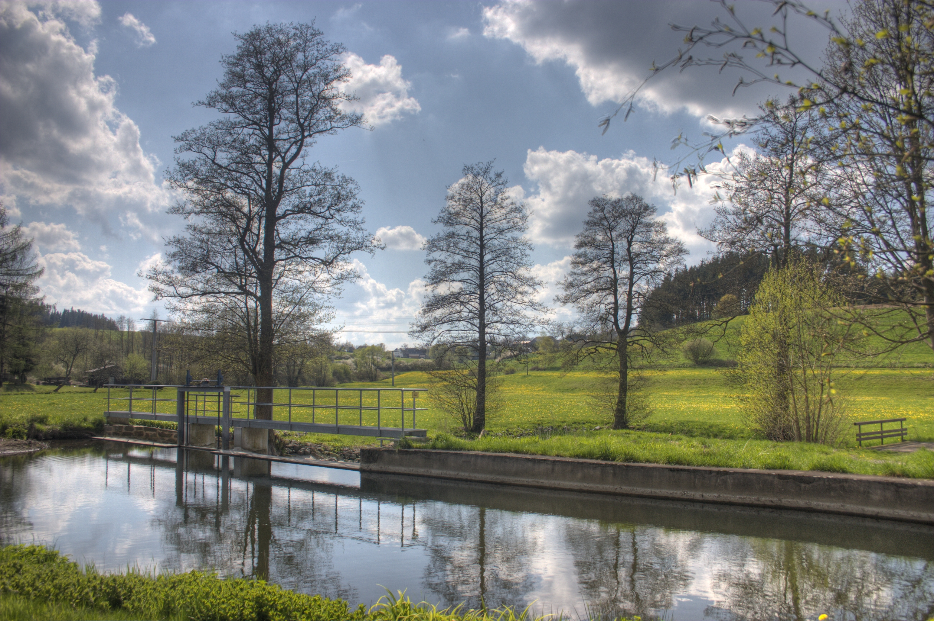 Schauenstein: Blick in das Selbitztal